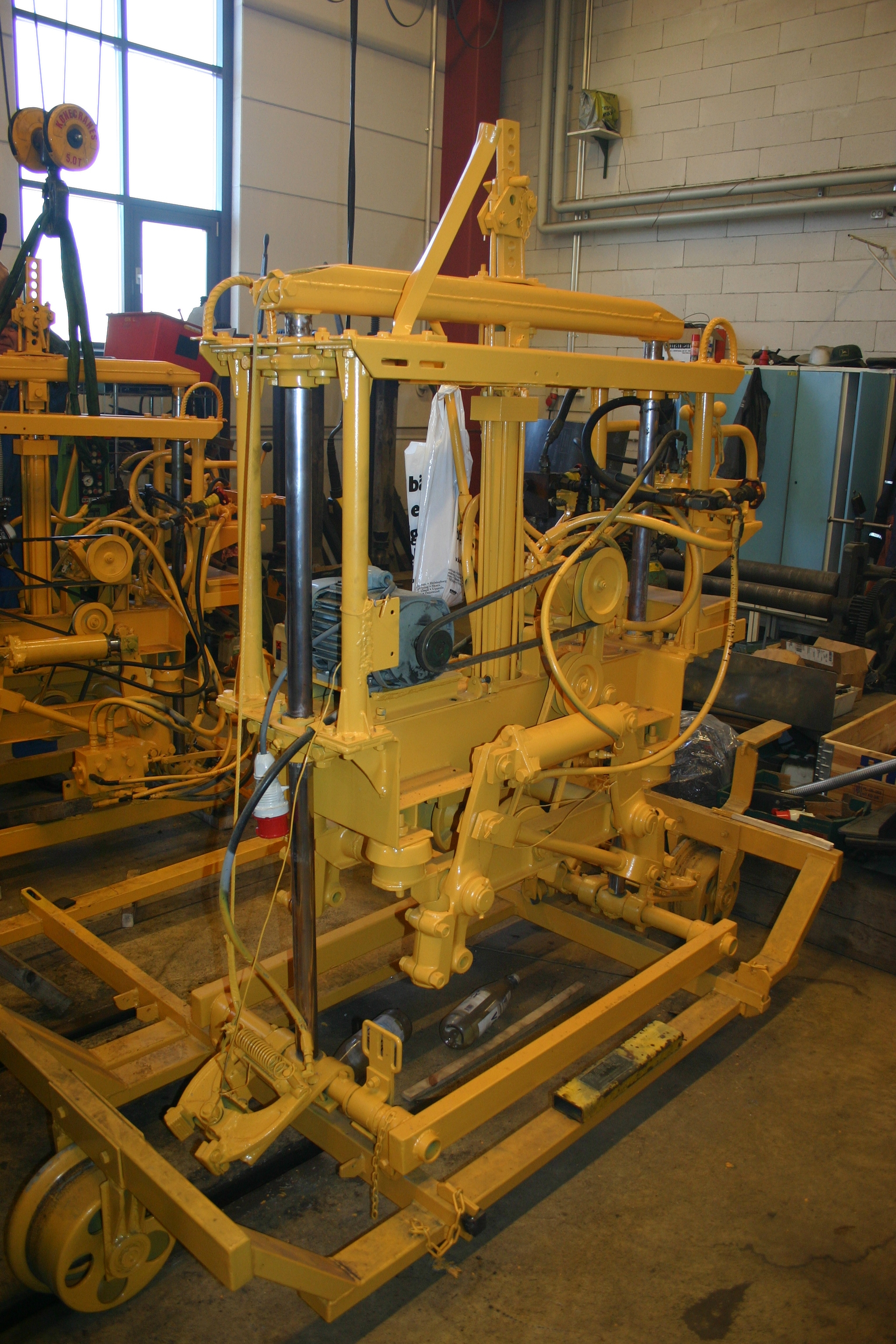 Kapearaiteinen raiteentukijakone